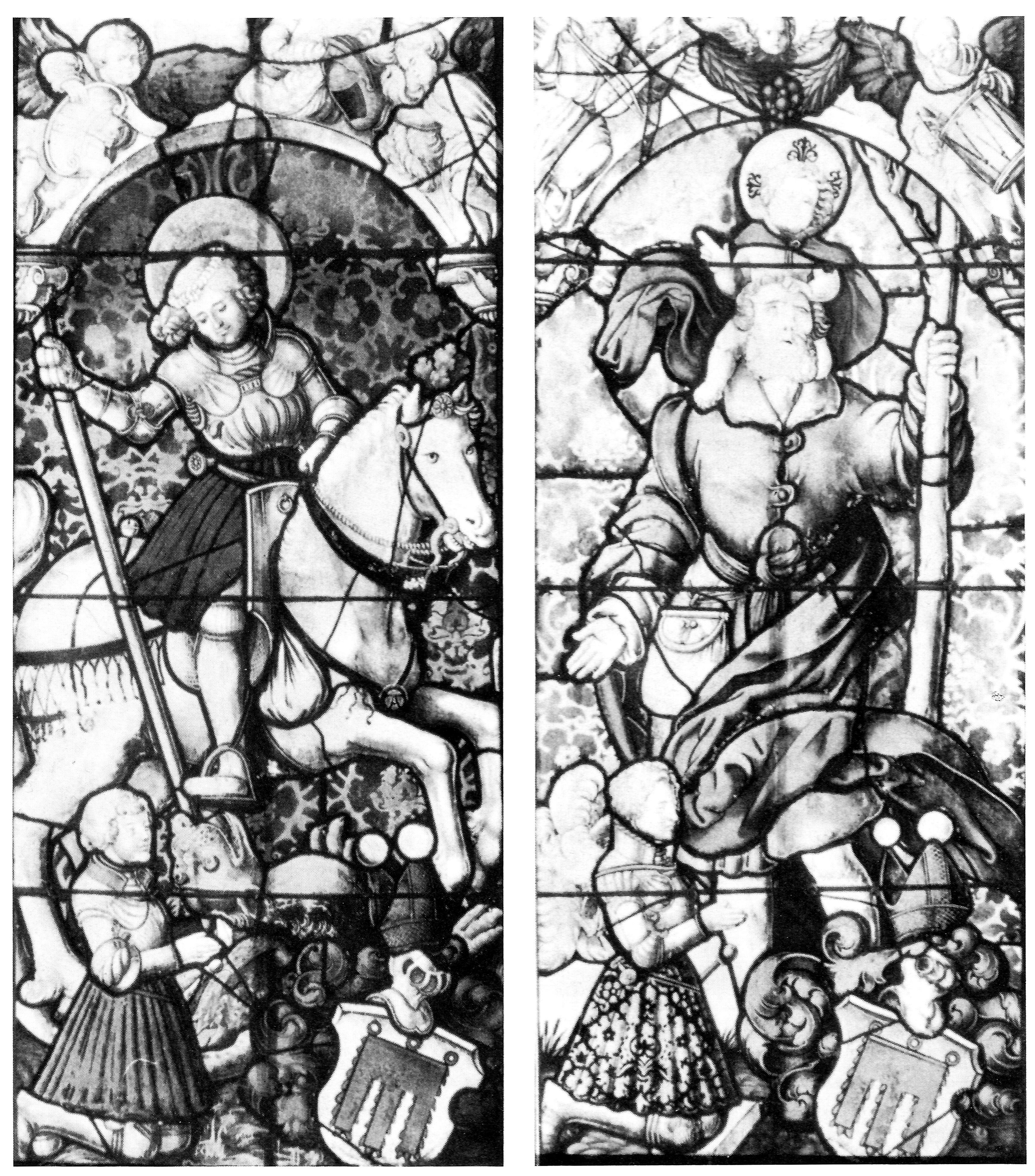 Die Grafen Georg und Konrad von Tübingen-Lichteneck. Wappenscheiben aus der Stadtkirche in Elzach.